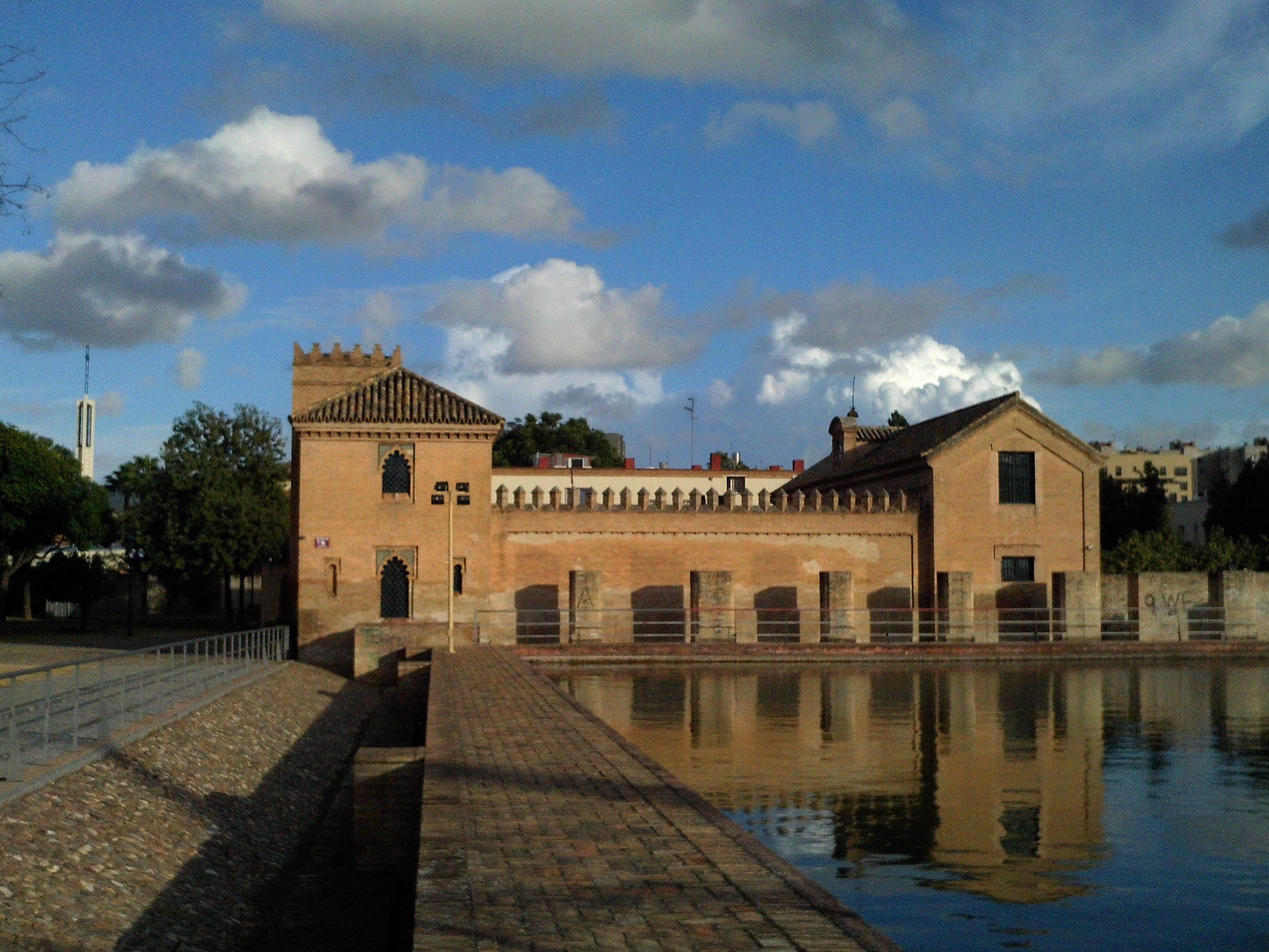 Palacio de la Buhaira junto a una alberca. Sevilla, Andalucía, España.